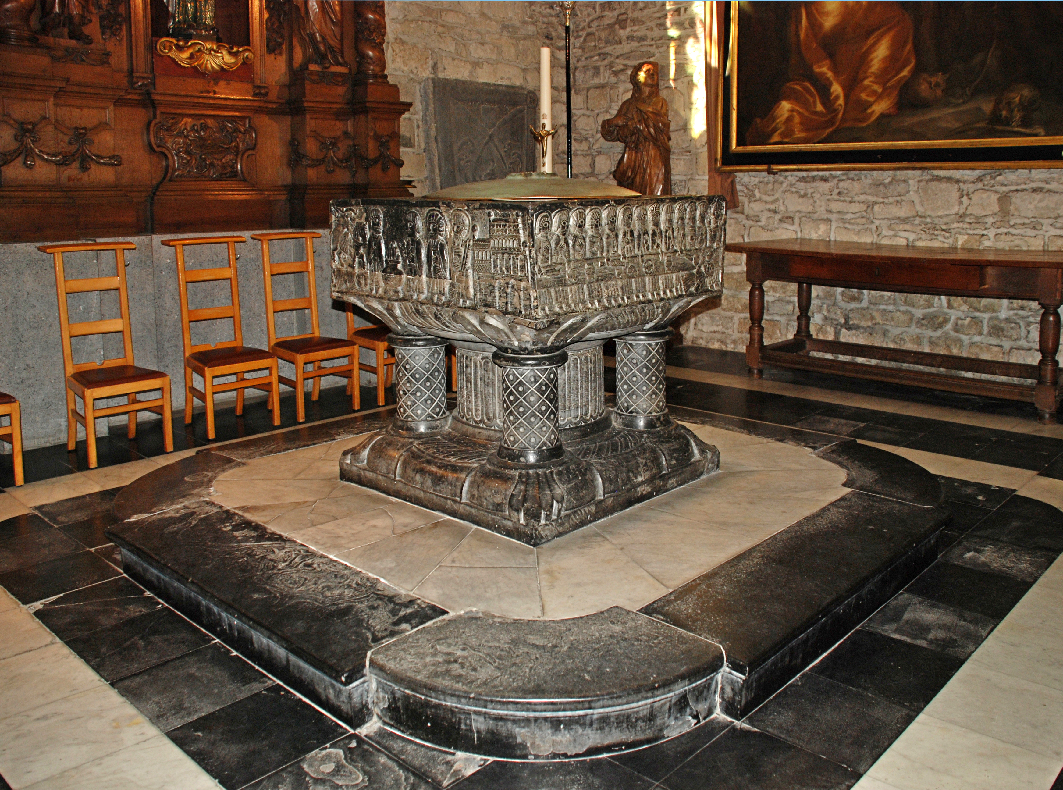 Belgique - Termonde - Église Notre-Dame de Termonde - Fonts baptismaux